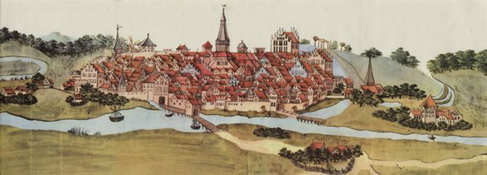 Gesamtansicht - Meister der Stralsunder Bilderhandschrift - Public Domain